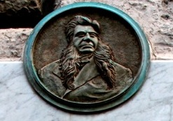 Effige del medico Antonio De Martino sulla facciata della propria abitazione.